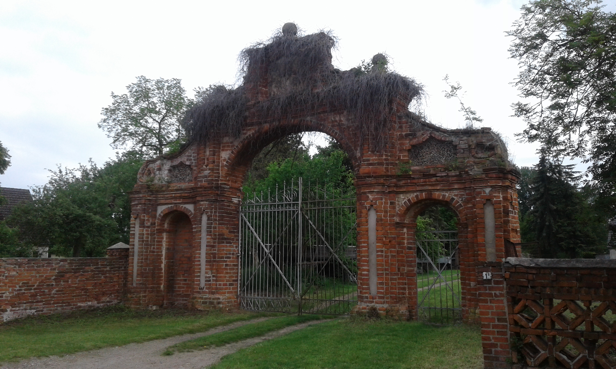 Tor des alten Herrenhauses